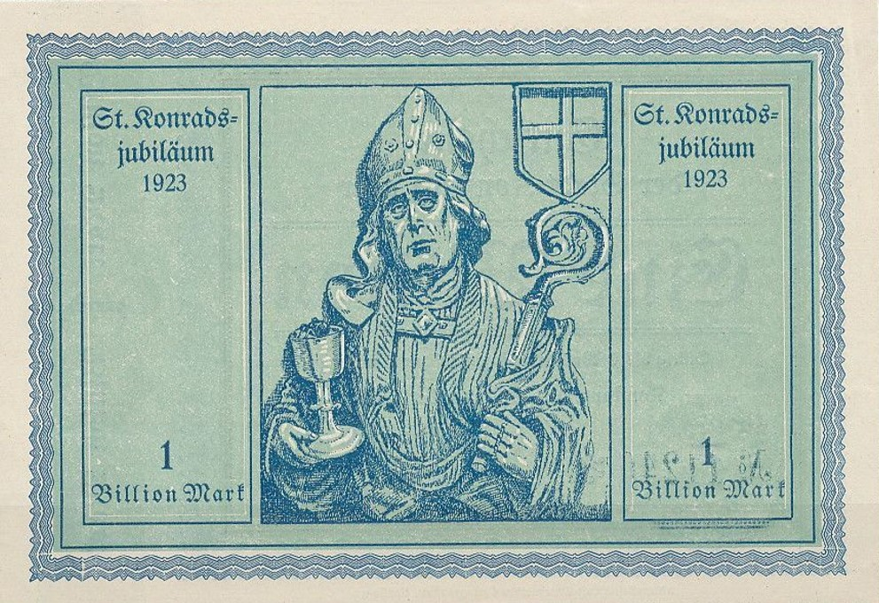 Deutschland (D) - Baden-Württemberg (BW) - Landkreis Konstanz (KN) - Konstanz: Notgeld-Schein der Stadt Konstanz, 1 Billion Mark (1923), Rückseite (34)